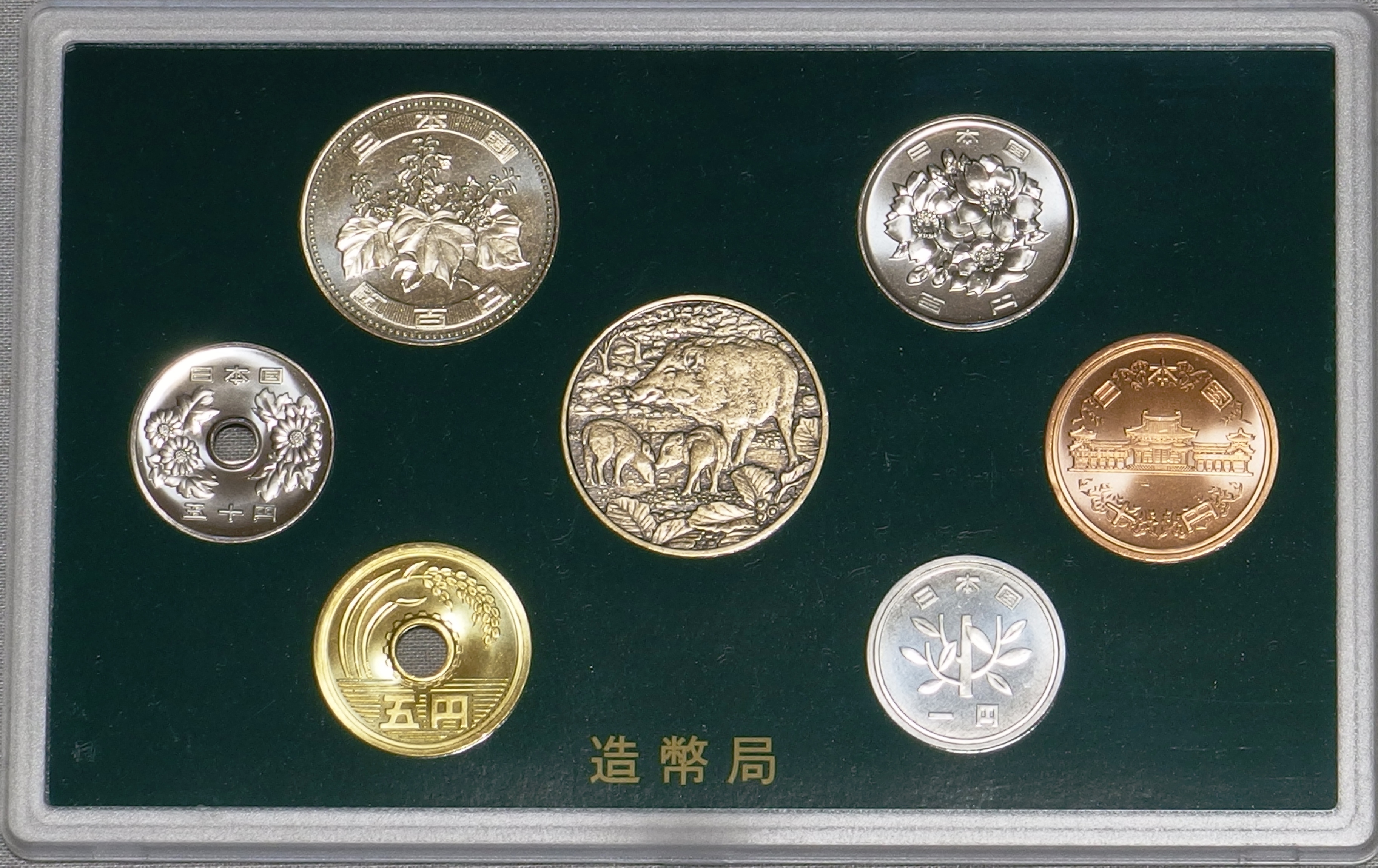 造幣局で販売した貨幣セット（平成31年銘）